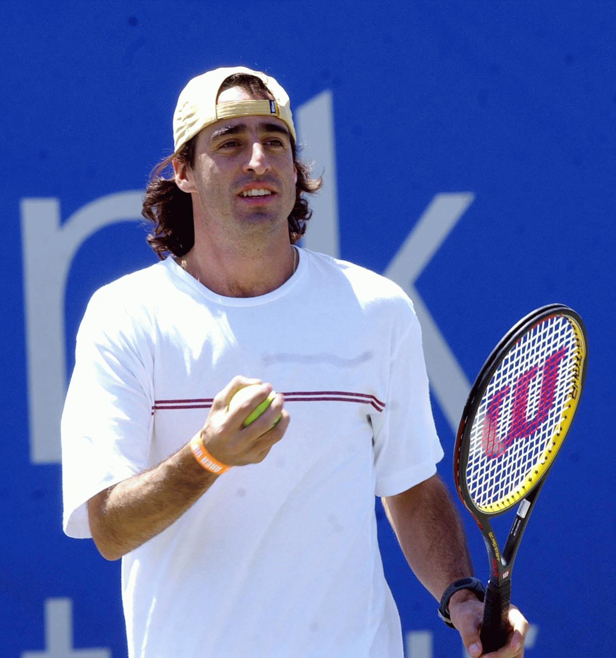 O tenista brasileiro Fernando Meligeni.